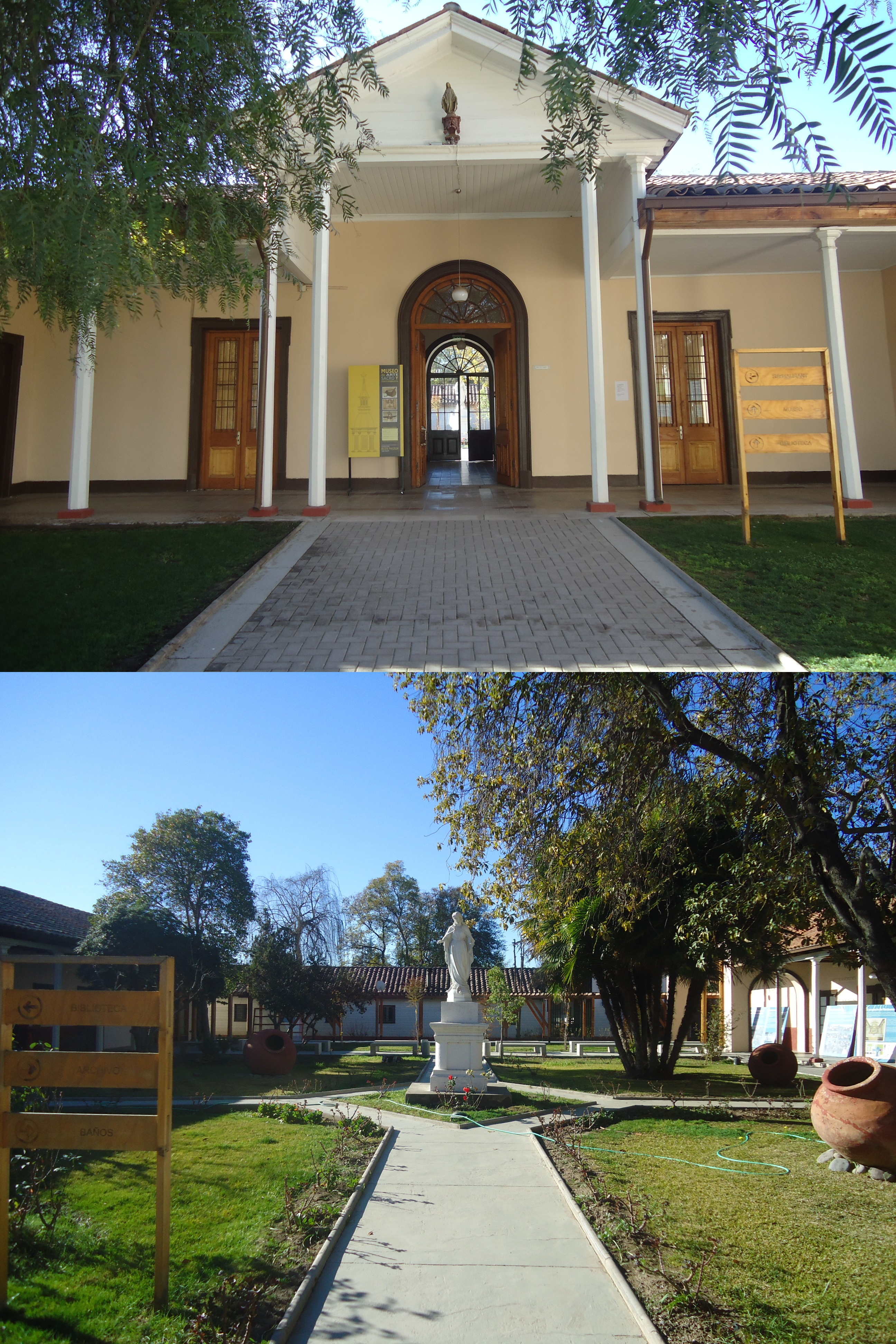 Antiguo claustro, actualmente museo